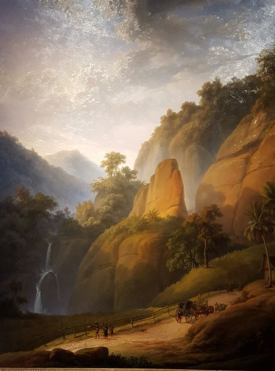 De Grote Postweg bij Rejapolah. oil on canvasmedium QS:P186,Q296955;P186,Q12321255,P518,Q861259. 167 × 140 cm (65.7 × 55.1 ″). Amsterdam, Rijksmuseum Amsterdam.